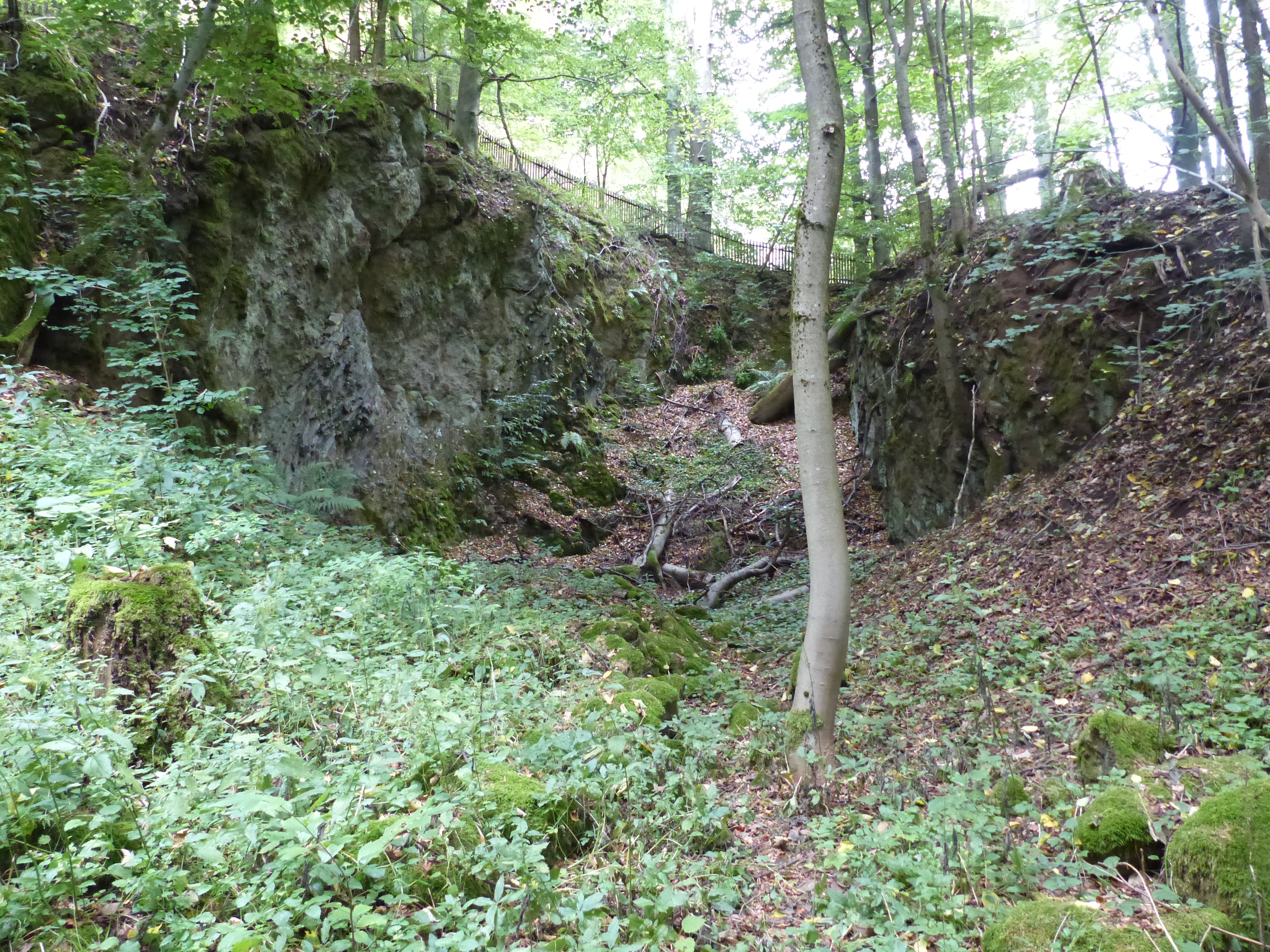 Ansicht Rauher Kulm